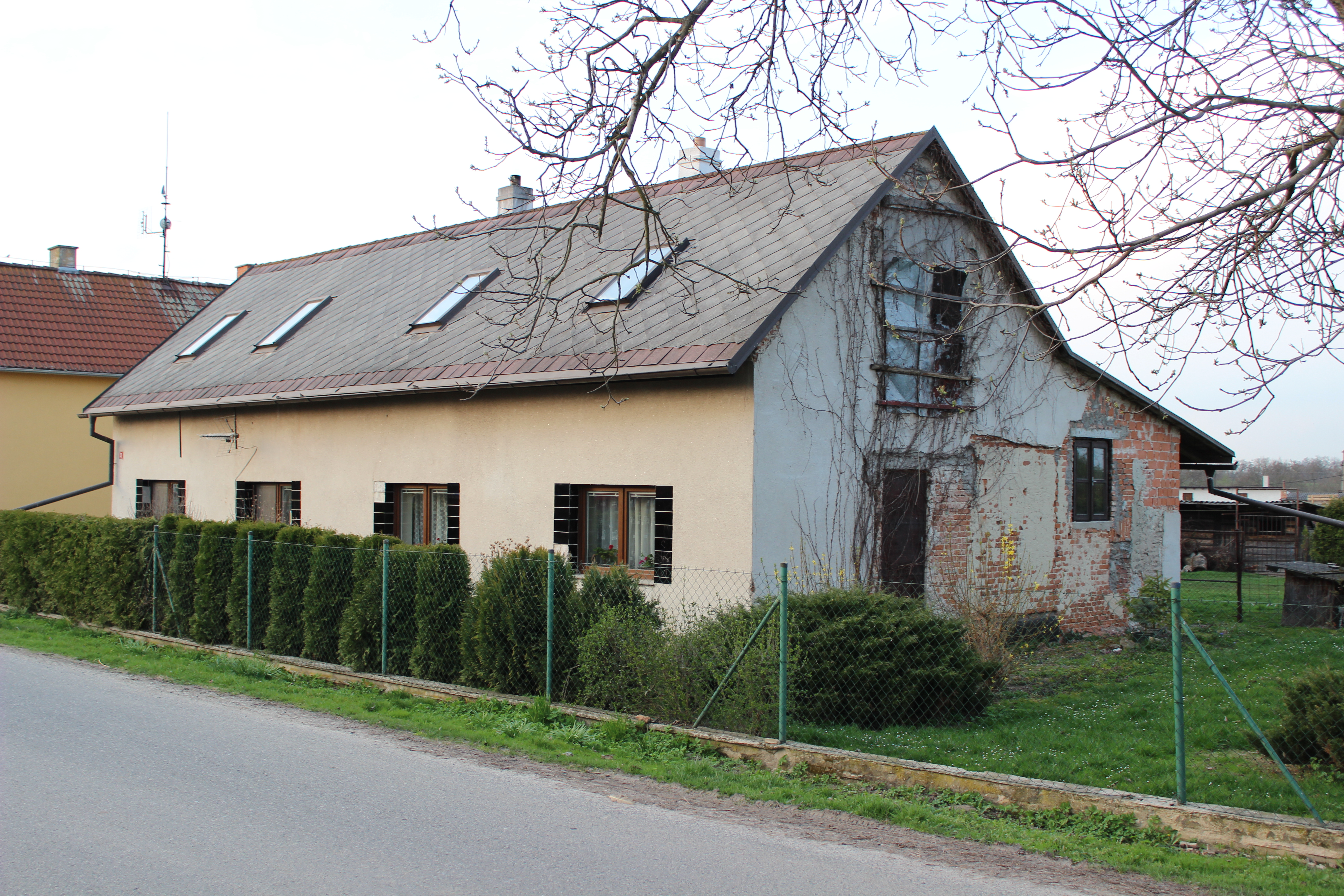 Dům číslo popisné 32 v Zamachách (pohled od jihovýchodu). This photograph was taken with a Canon EOS 600D.